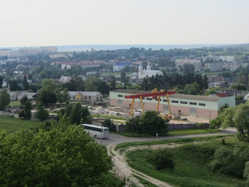 Ваўкавыск. Краявід са Шведскай гары